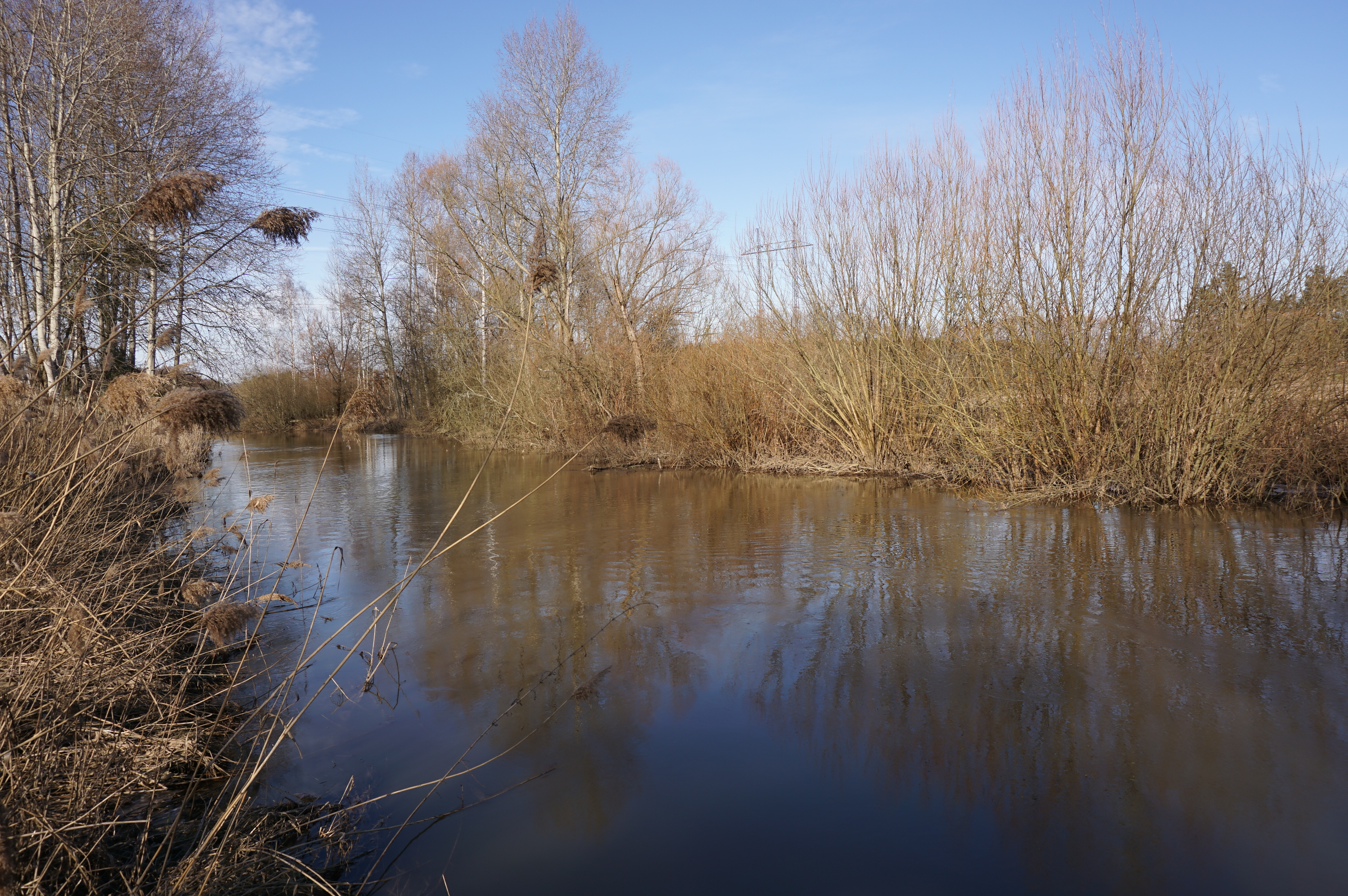 PP Niva Ploučnice u Žizníkova - nejjižnější část chráněného území u železničního mostu u Vítkova